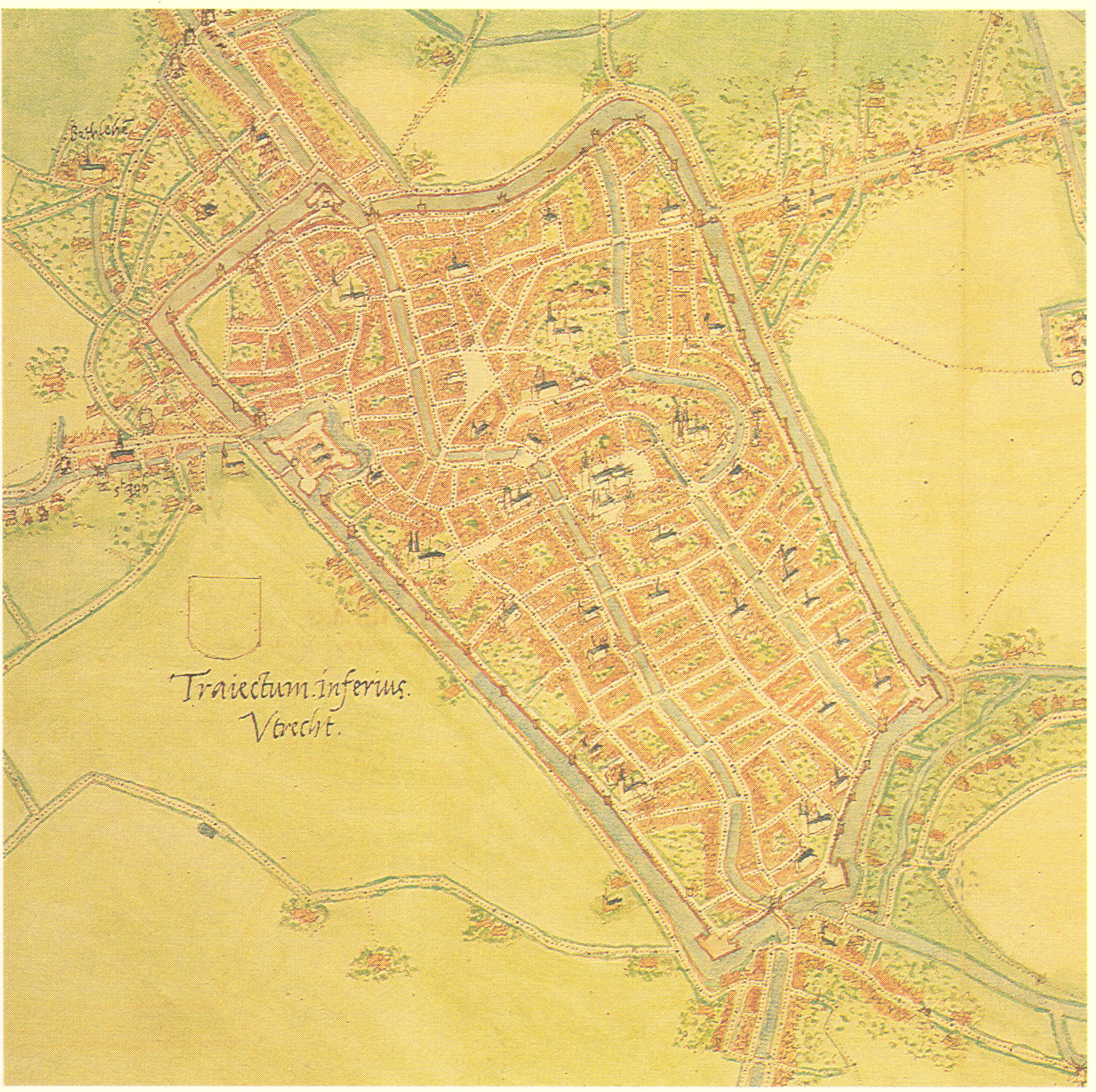 Plattegrond van Jacob van Deventer van de stad Utrecht